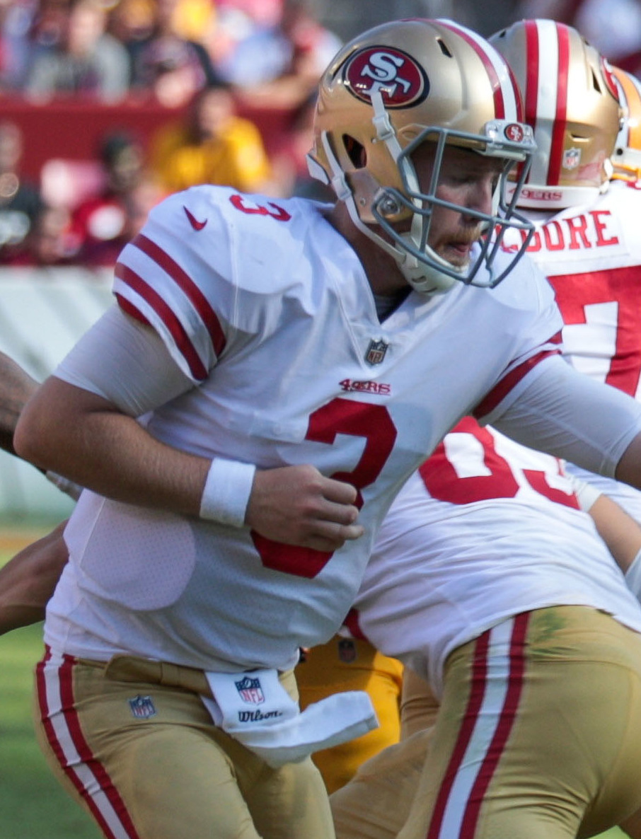 49ers at Redskins 10/15/17